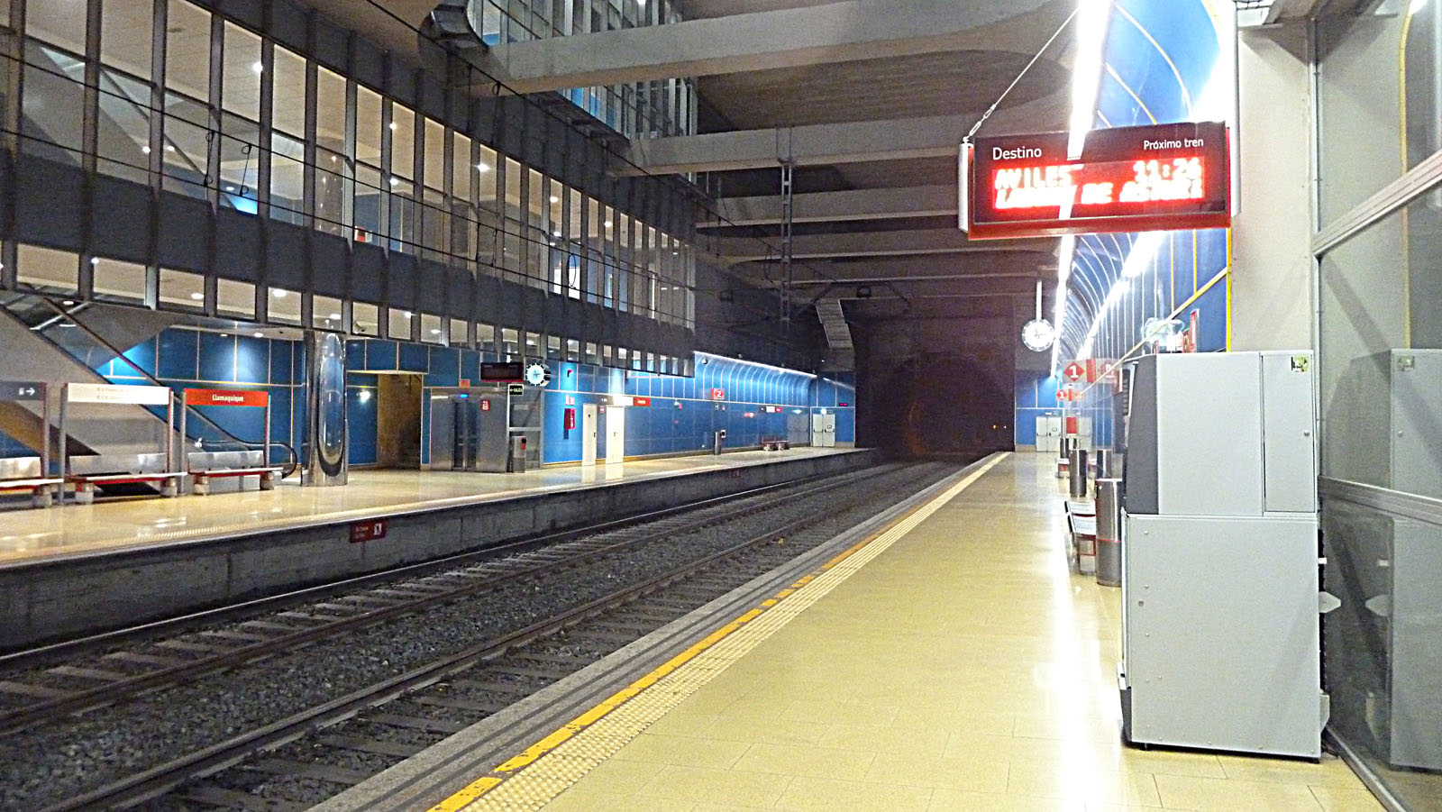 Andenes de la estación de Llamaquique